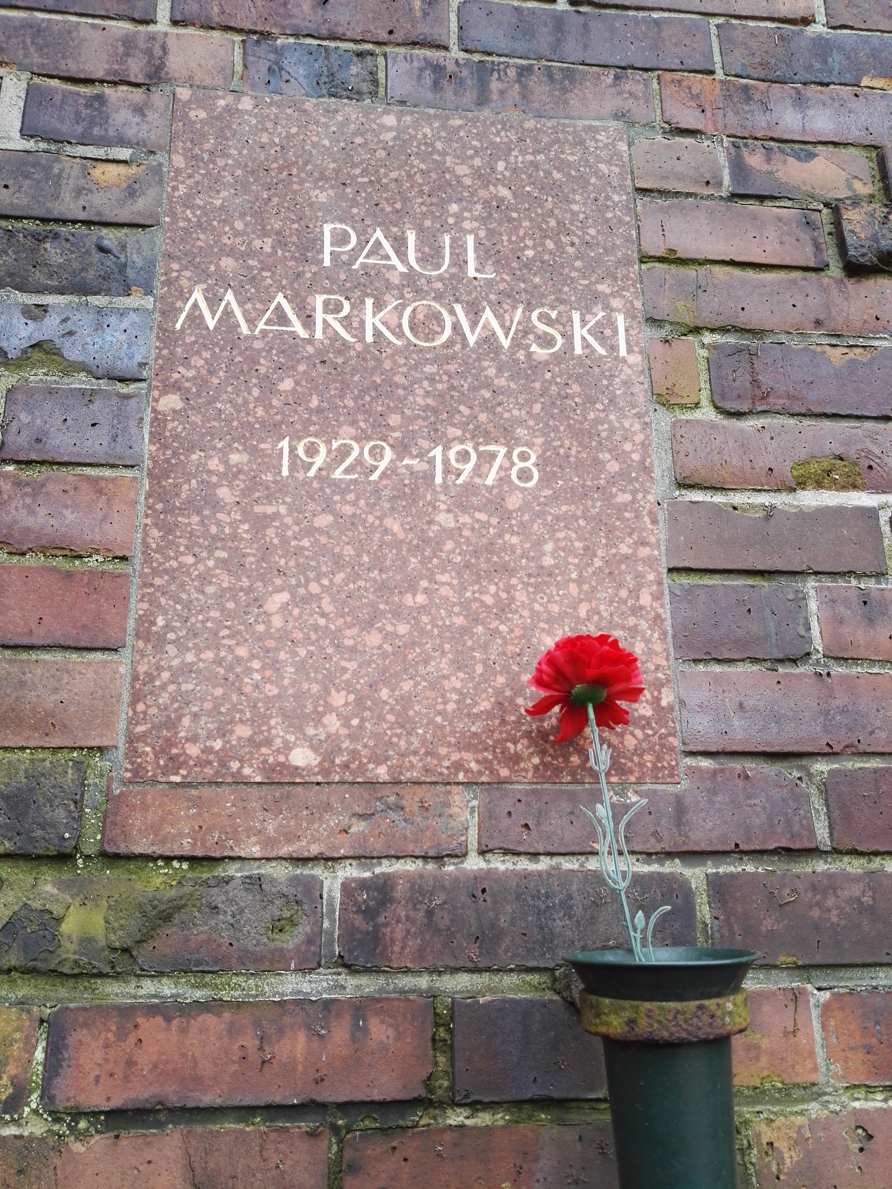 Grab von Paul Markowski in der Gedenkstätte der Sozialisten auf dem Zentralfriedhof Friedrichsfelde in Berlin-Lichtenberg